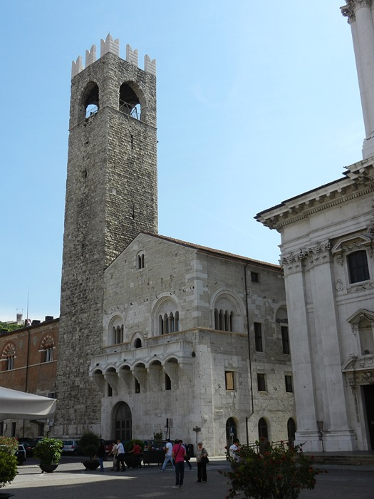 Brescia - Broletto